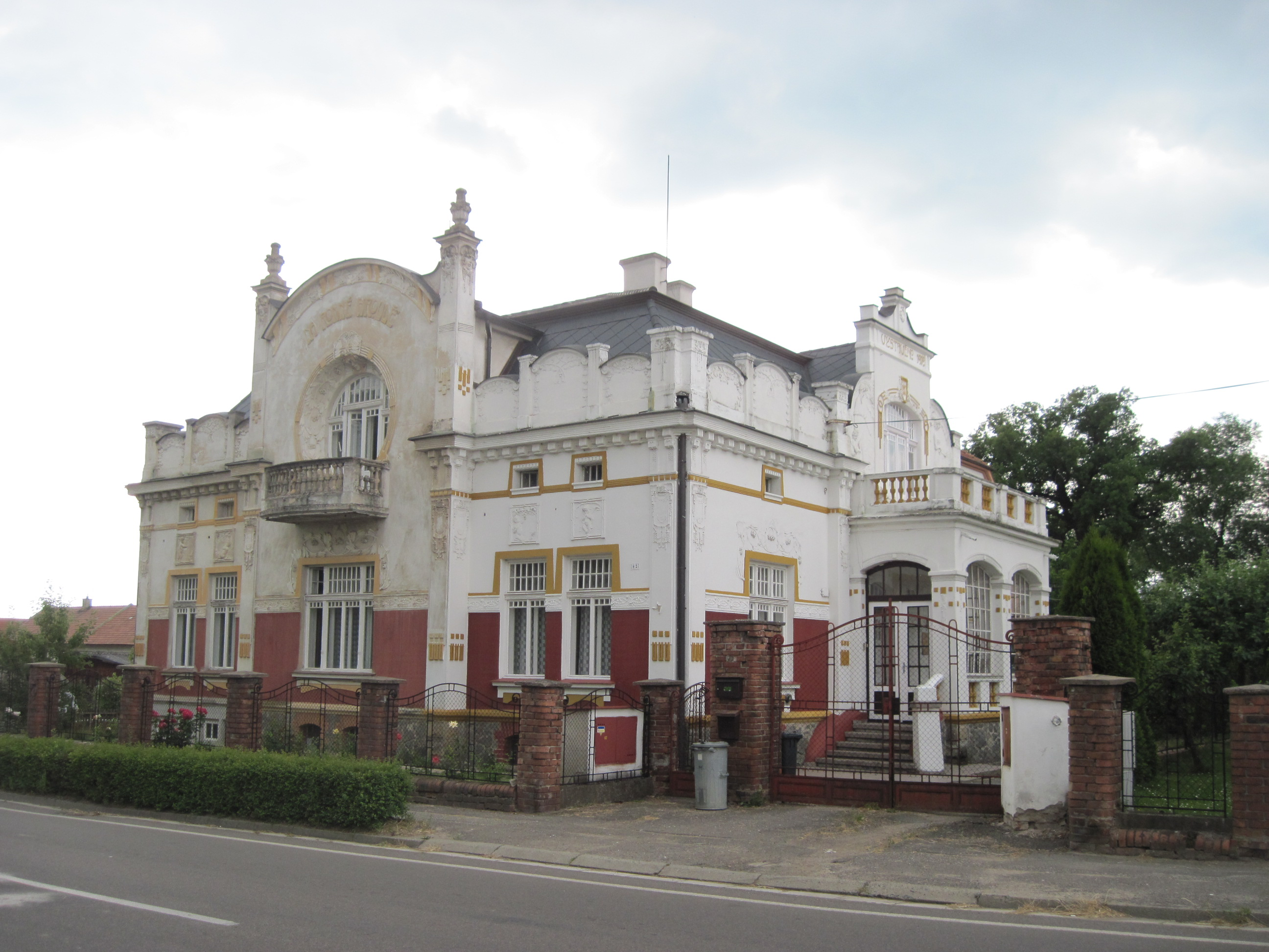 Mandysova vila, ul. Staroholická 62